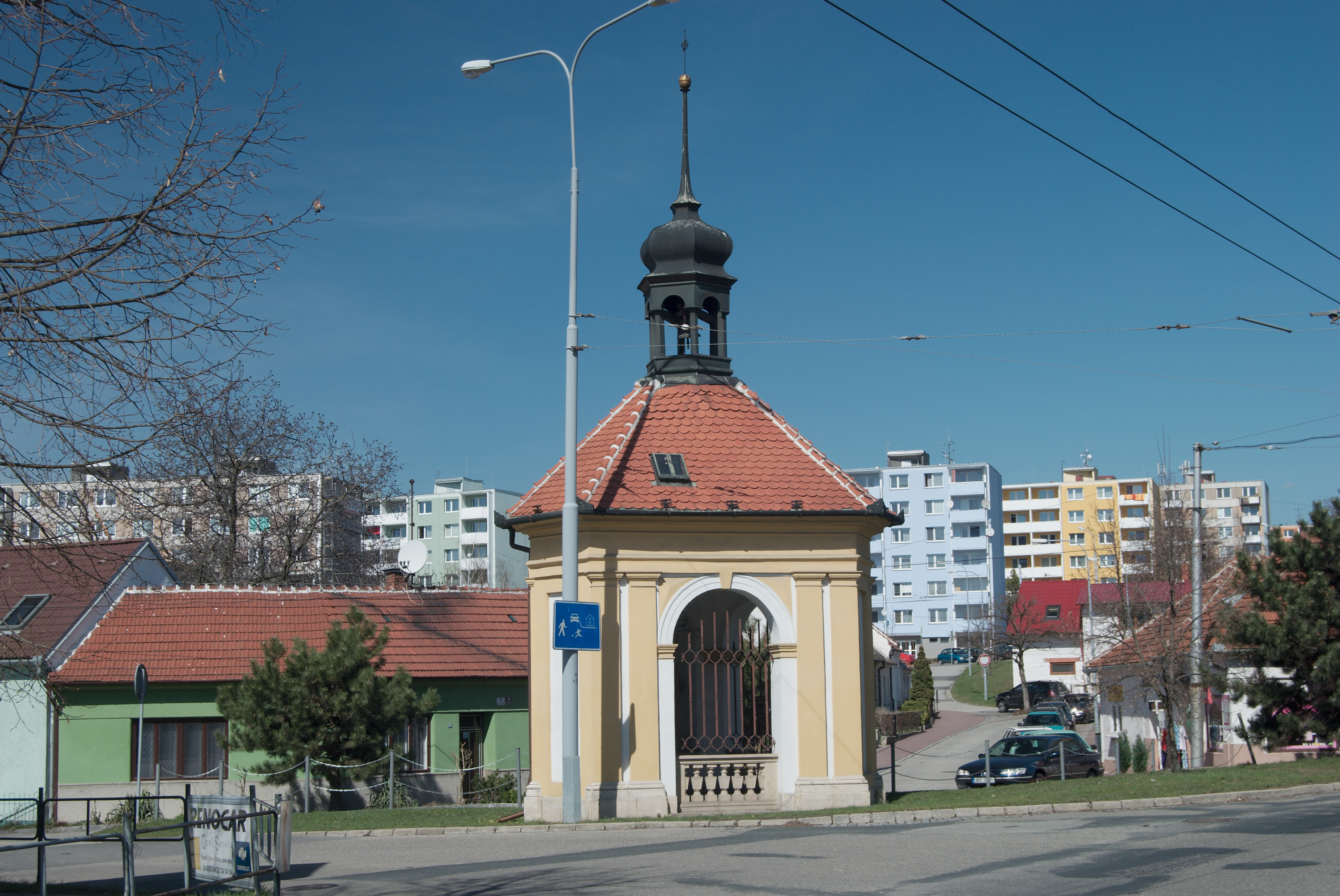 Brno-Slatina - pohled na sever z křižovatky ulic Tuřanka a Kikrleho